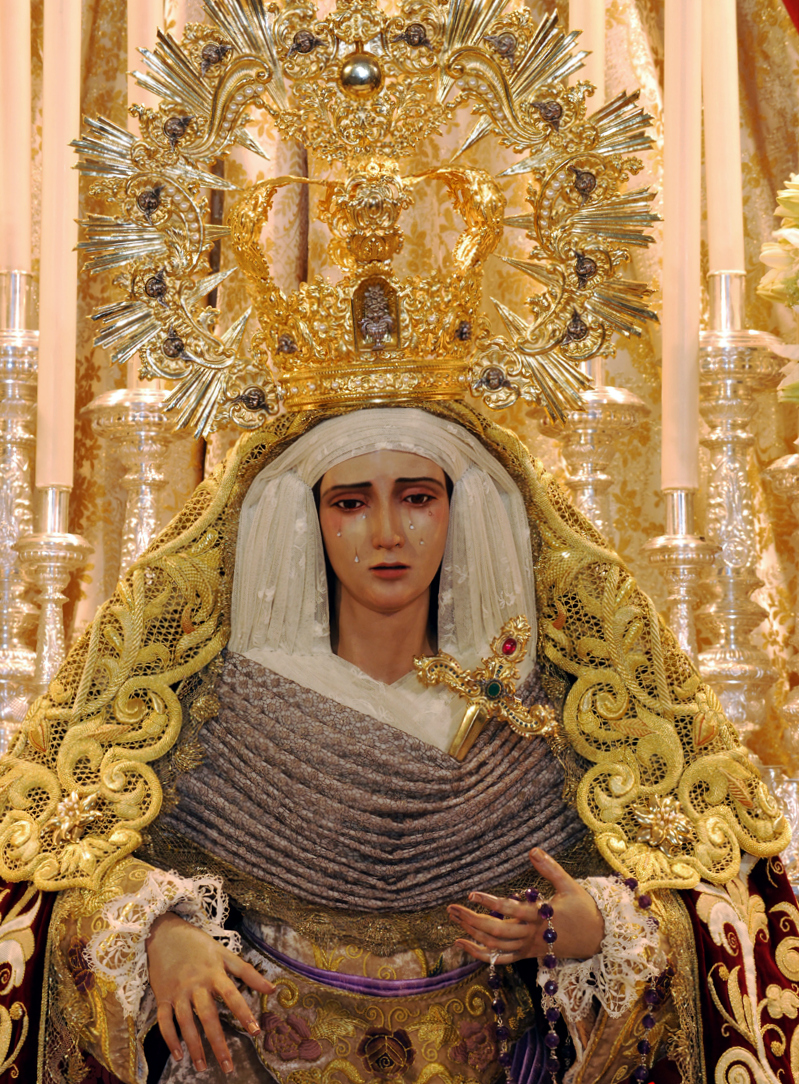 Sra. del Buen Fin